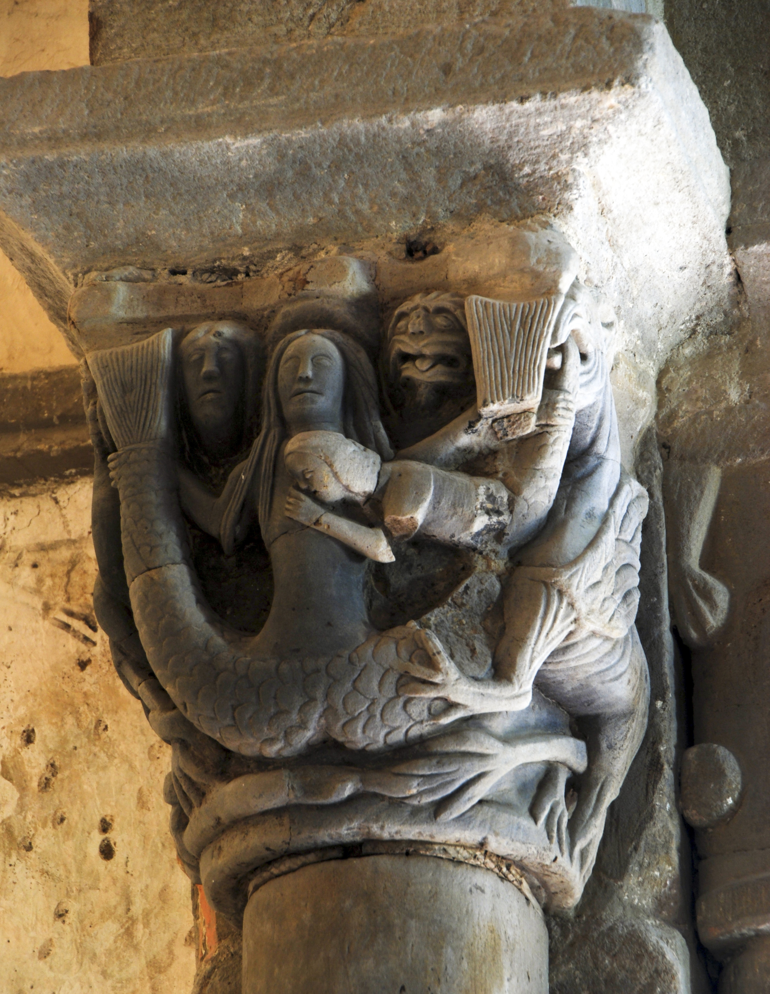 Capitel interior del lado derecho del Arco Triunfal. Sirena de doble cola amamantando y otros seres fantásticos.